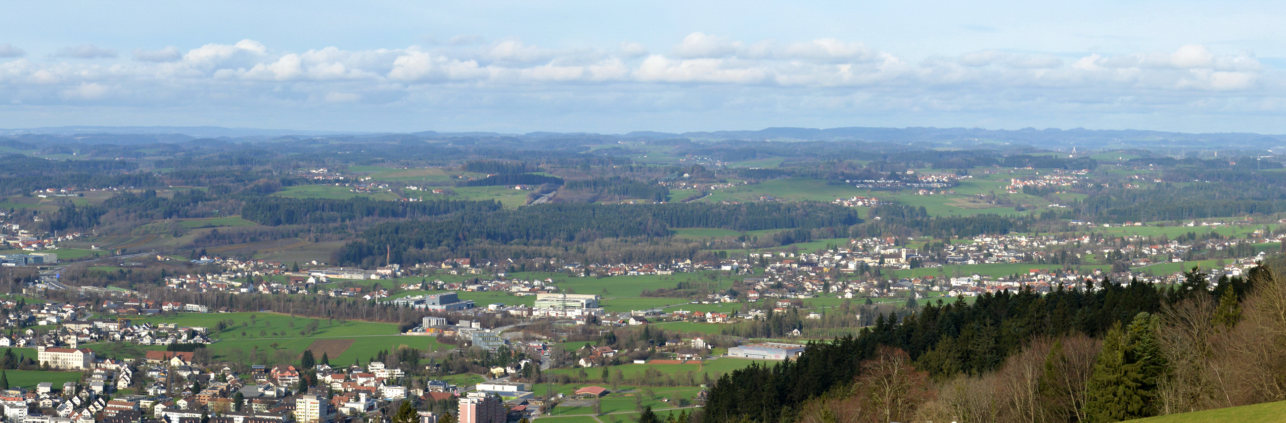 Hörbranz ist eine Marktgemeinde mit 6317 Einwohnern (Stand 1. Jänner 2014) in Österreich in Vorarlberg im Bezirk Bregenz.